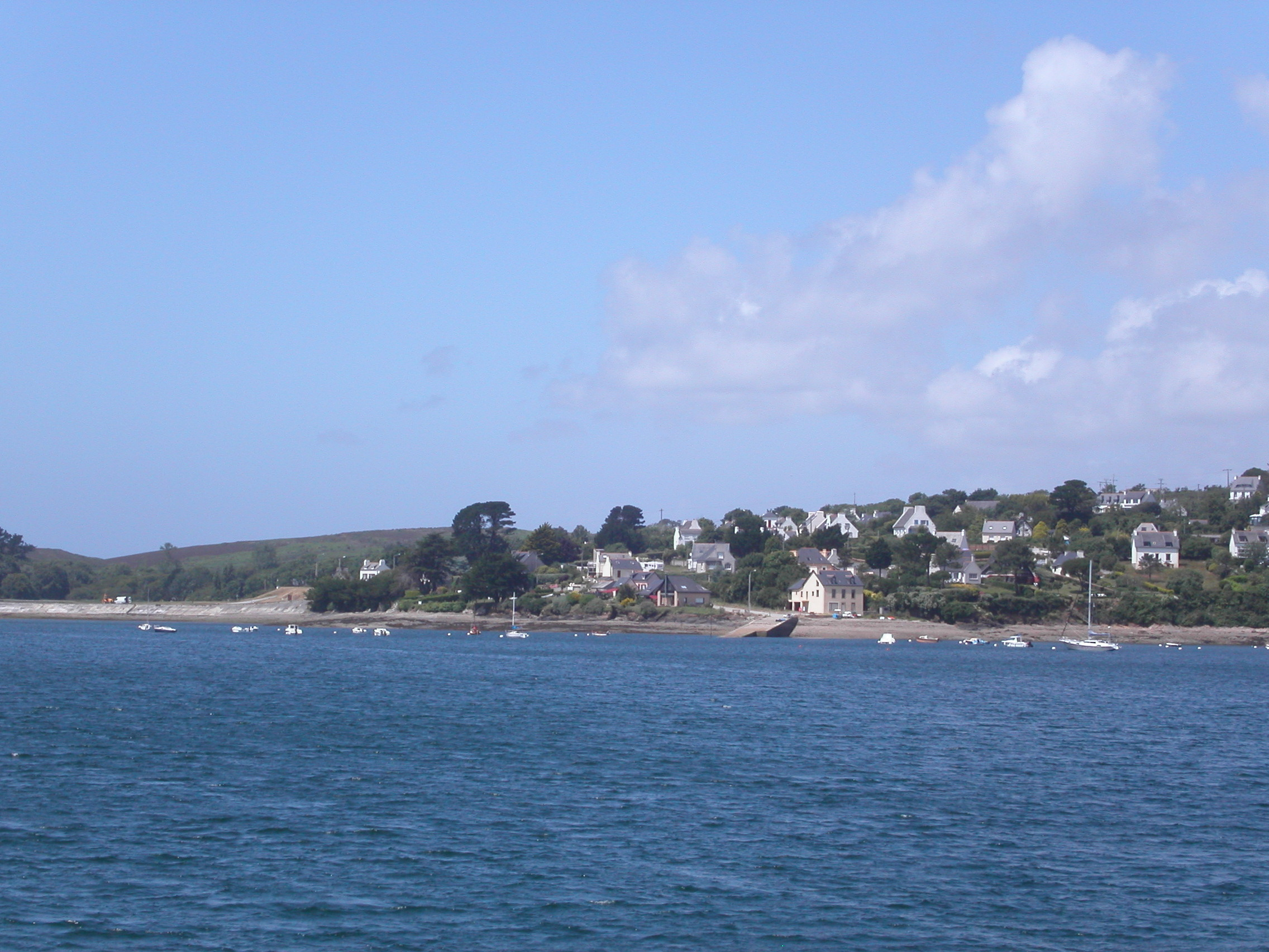 Roscanvel vu de la rade de Brest